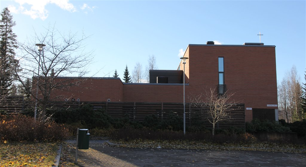 Petosen seurakuntatalo Kuopion Petosten (kaupunginosajaottelun mukaan Litmasen kaupunginosan) keskustassa Vapaudenaukion laidalla (Pyörönkaari 21).